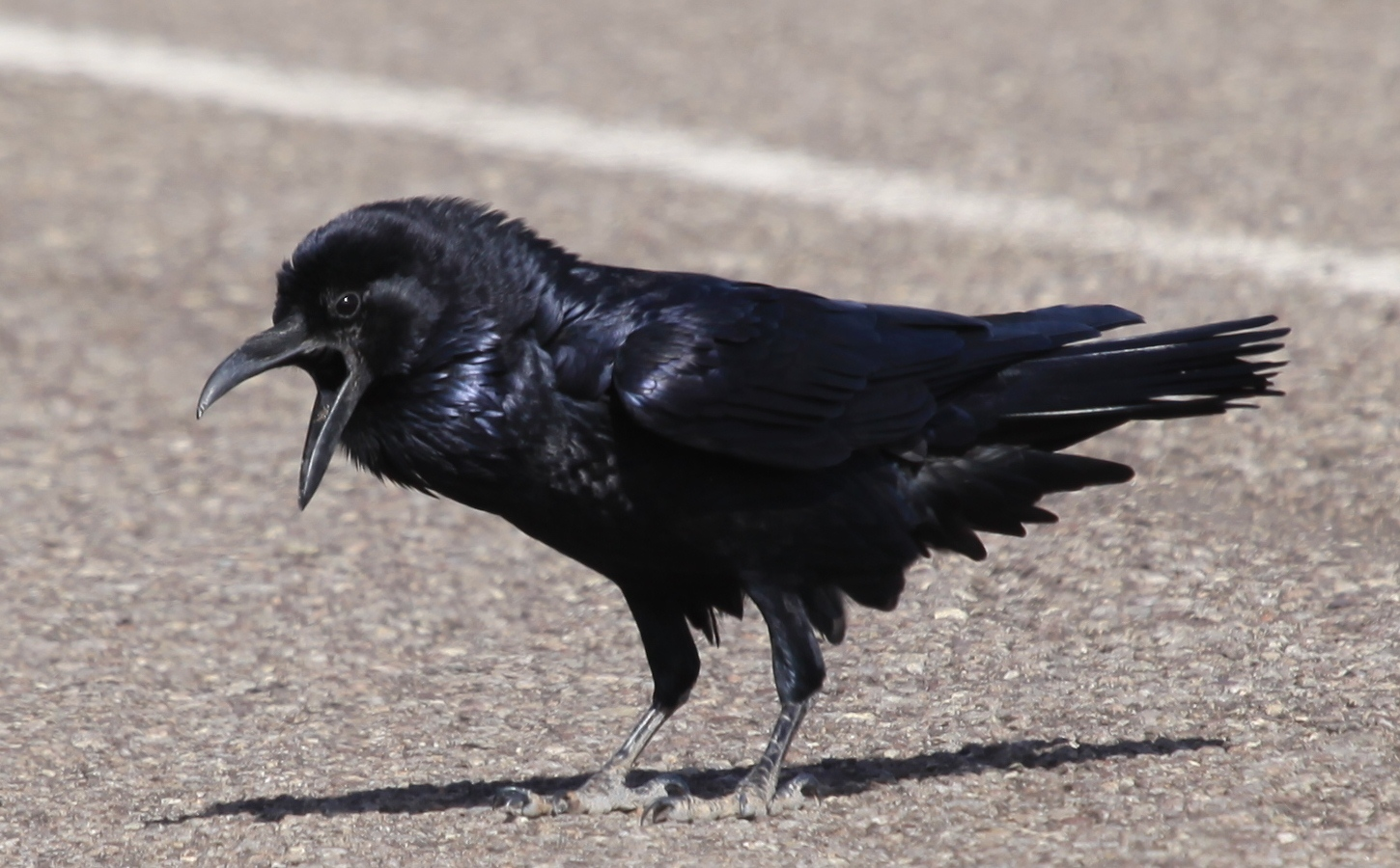 Cuervo Llanero